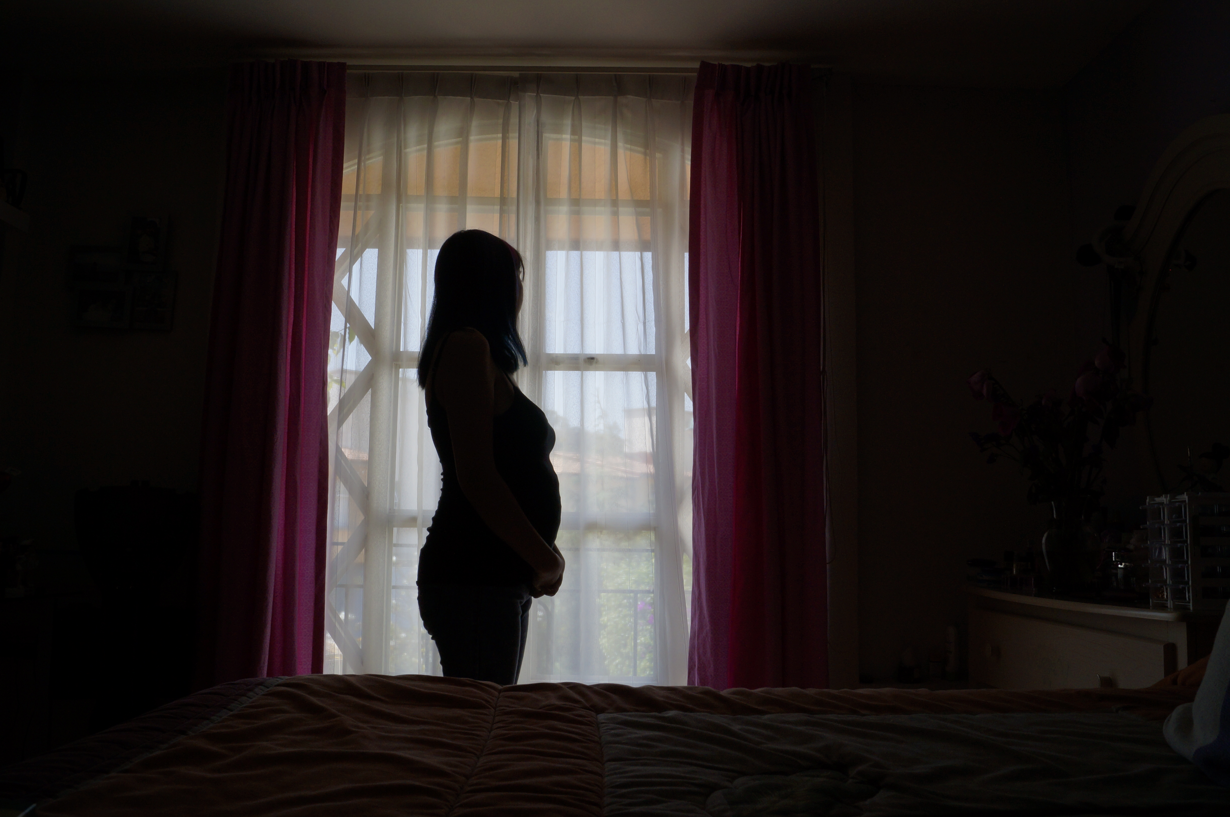 Mariana se da cuenta que su cuerpo presenta cambios físicos, ya no luce su esbeltez, ahora, observa cómo mes con mes su vientre crece poco a poco y dentro de poco dará a luz a su bebé.